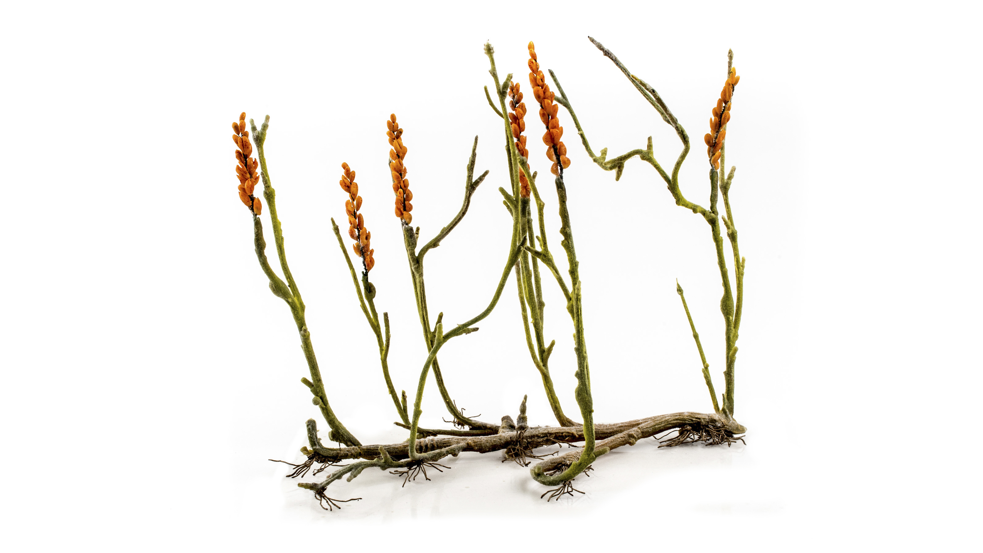 Zosterofillo. Ricostruzione in scala 3:1.